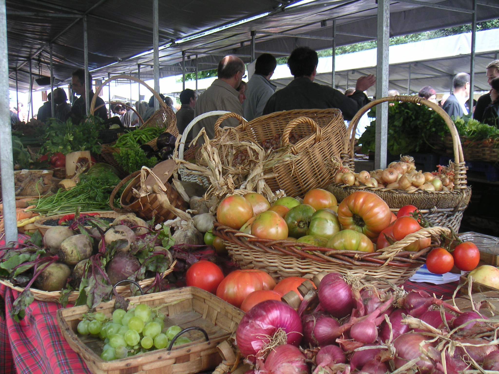 Iraileko hirugarren igandean ospatzen den produktu biolojikoen feria.